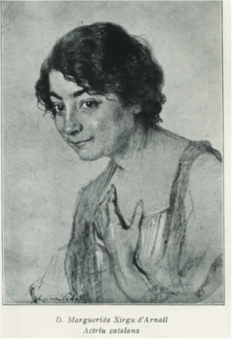 Sanguina de Lluïsa Vidal de Marguerida Xirgú Publicat a Feminal al juny de 1914